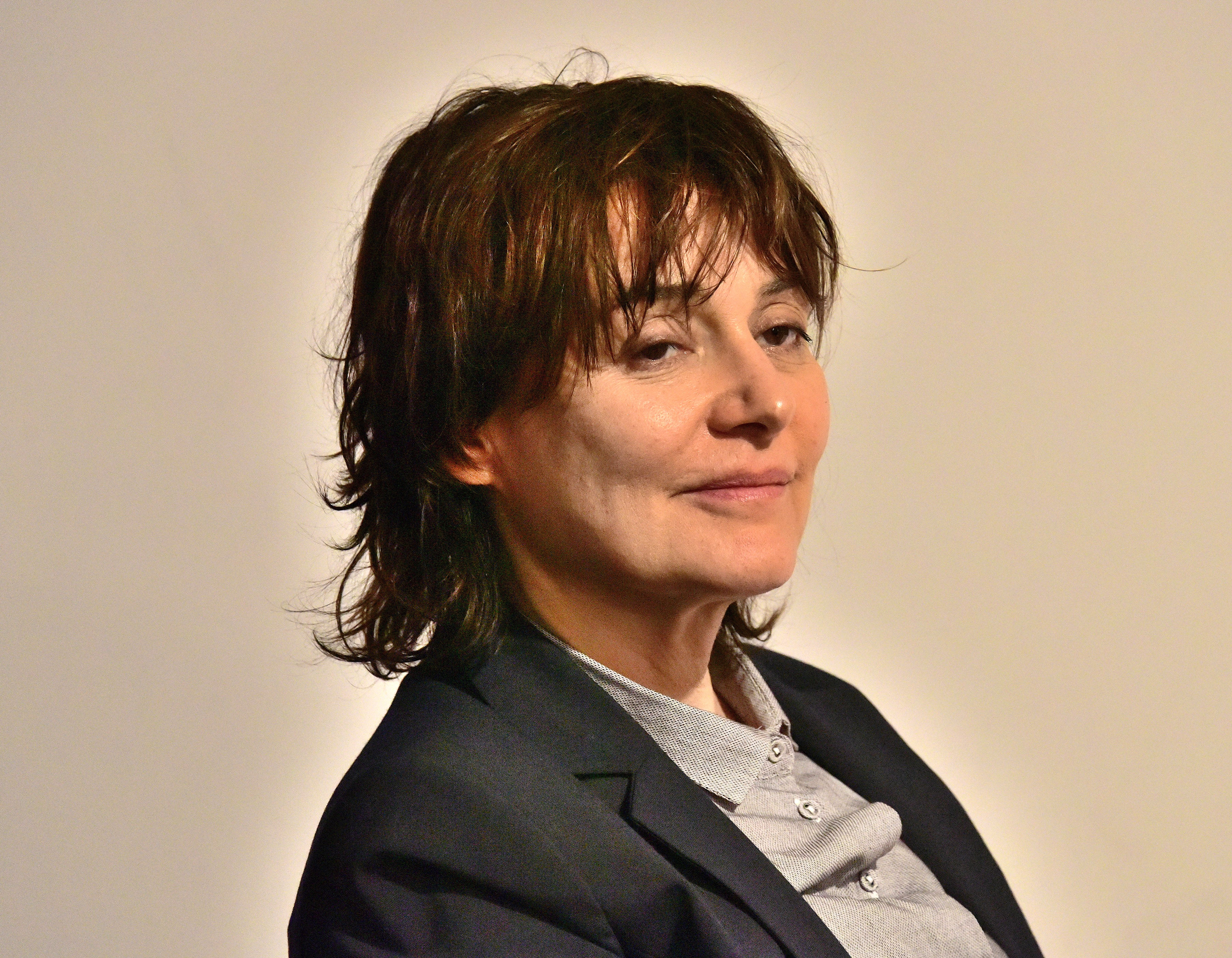 Kazimiera Szczuka